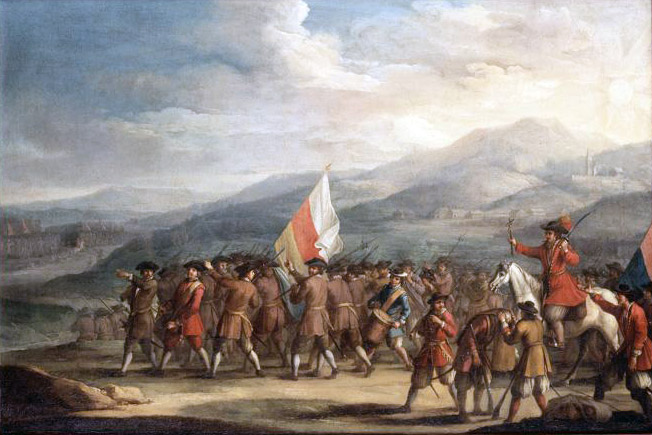 Zug der Innerschweizer in die Zweite Schlacht von Villmergen AG vom 25. Juli 1712. Öl auf Leinwand; aus Schloss Steinhof in Luzern. 65.5 cm x 97.5 cm Schweizerisches Landesmuseum, Zürich